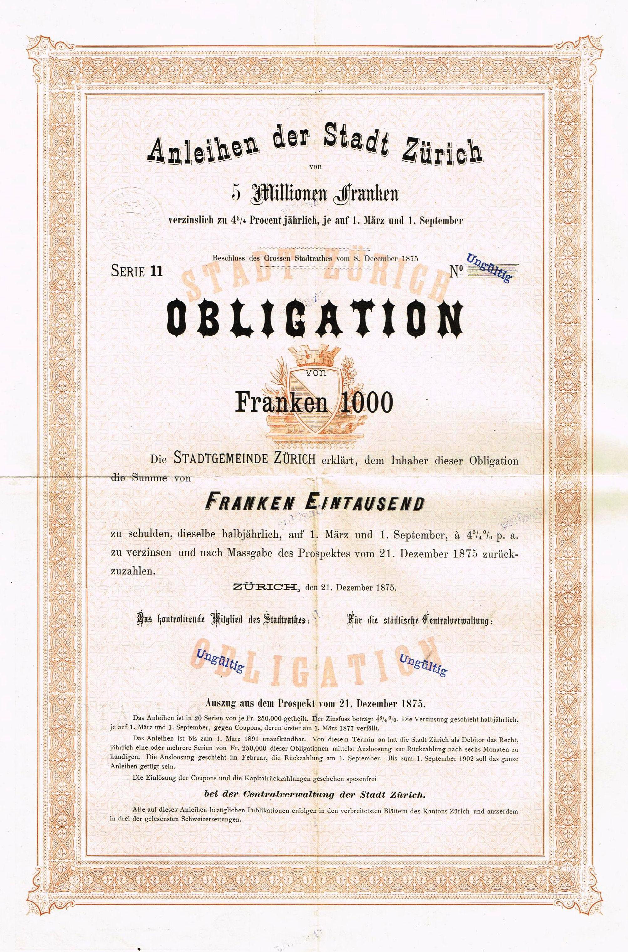 4.75%-Obligation Serie 11 über 1000 Franken der Stadt Zürich vom 21. Dezember 1875